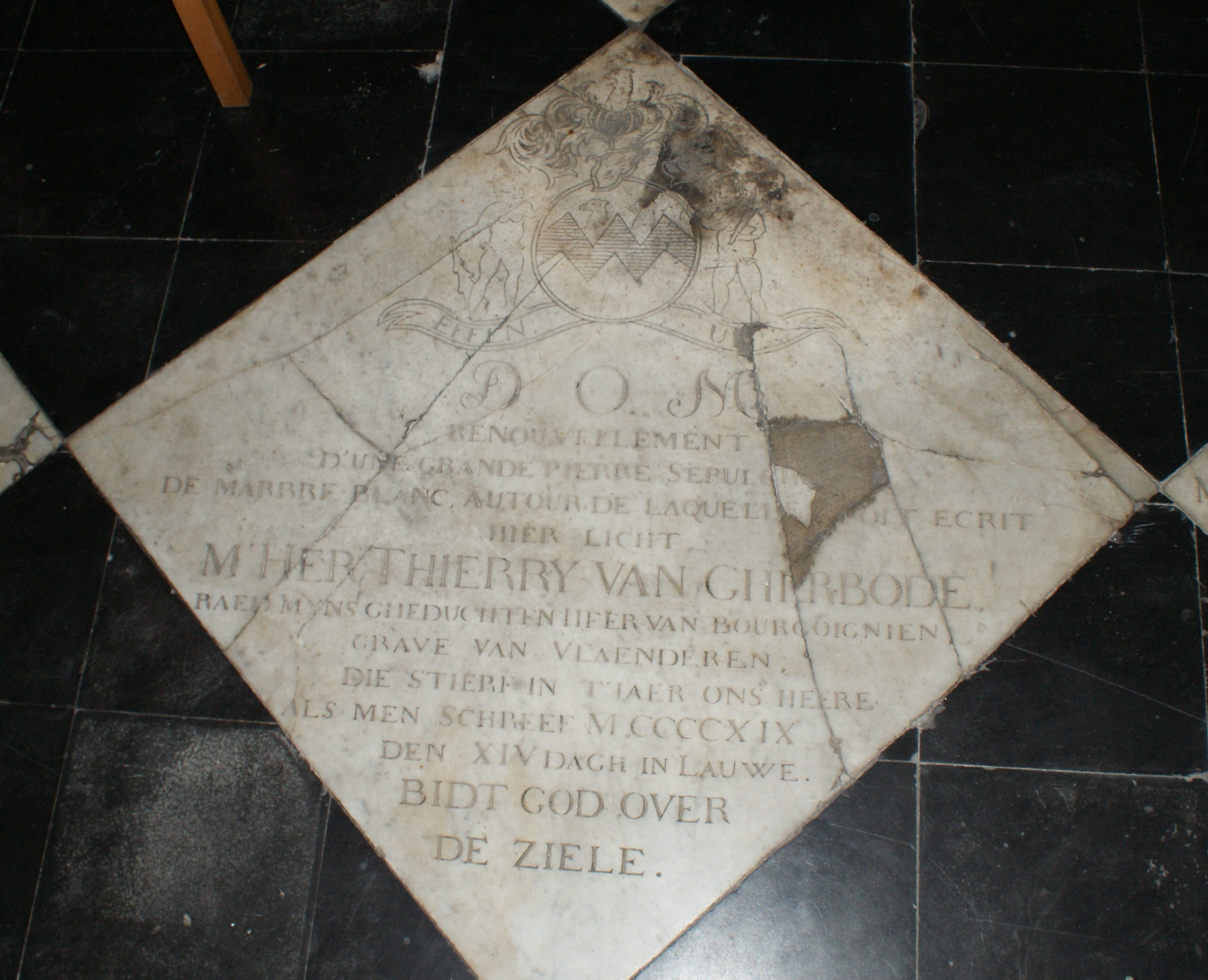 Grafsteen van Diederik van Gherbode uit 1419, raadgever van de graaf van vlaanderen, in de Sint-Medarduskerk van Wervik.